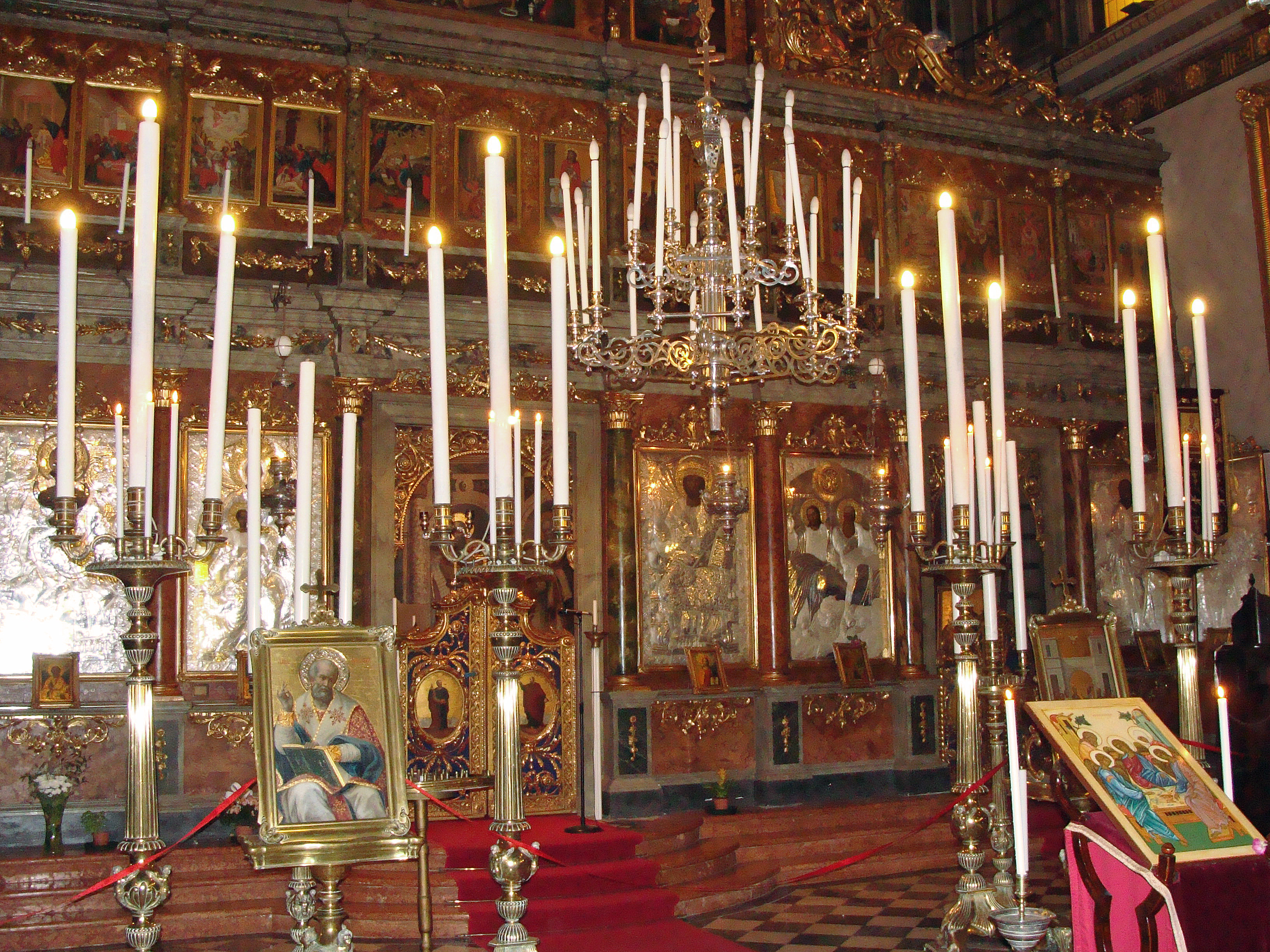 église San Nicolo dei Greci à Trieste